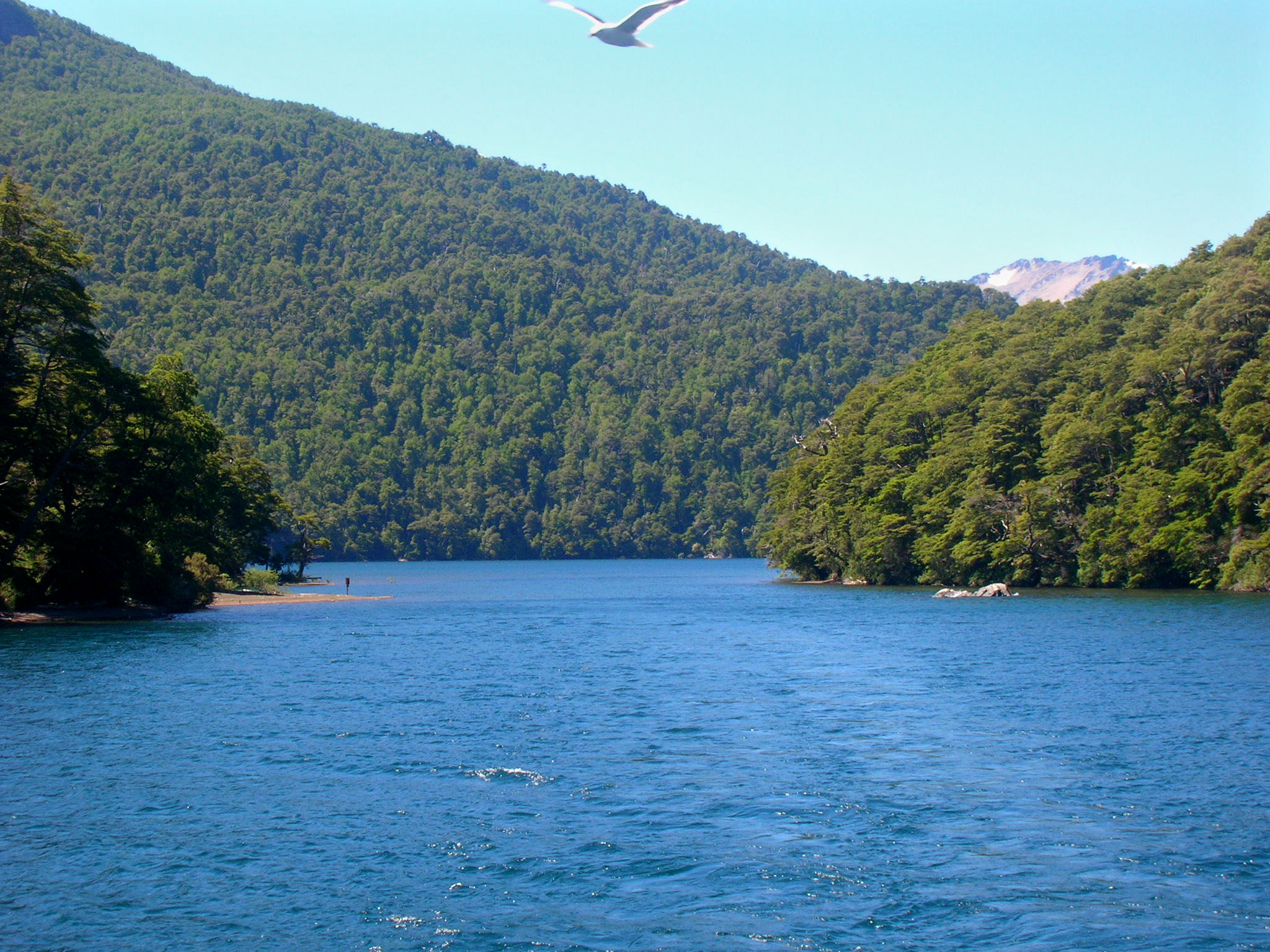 Estrecho